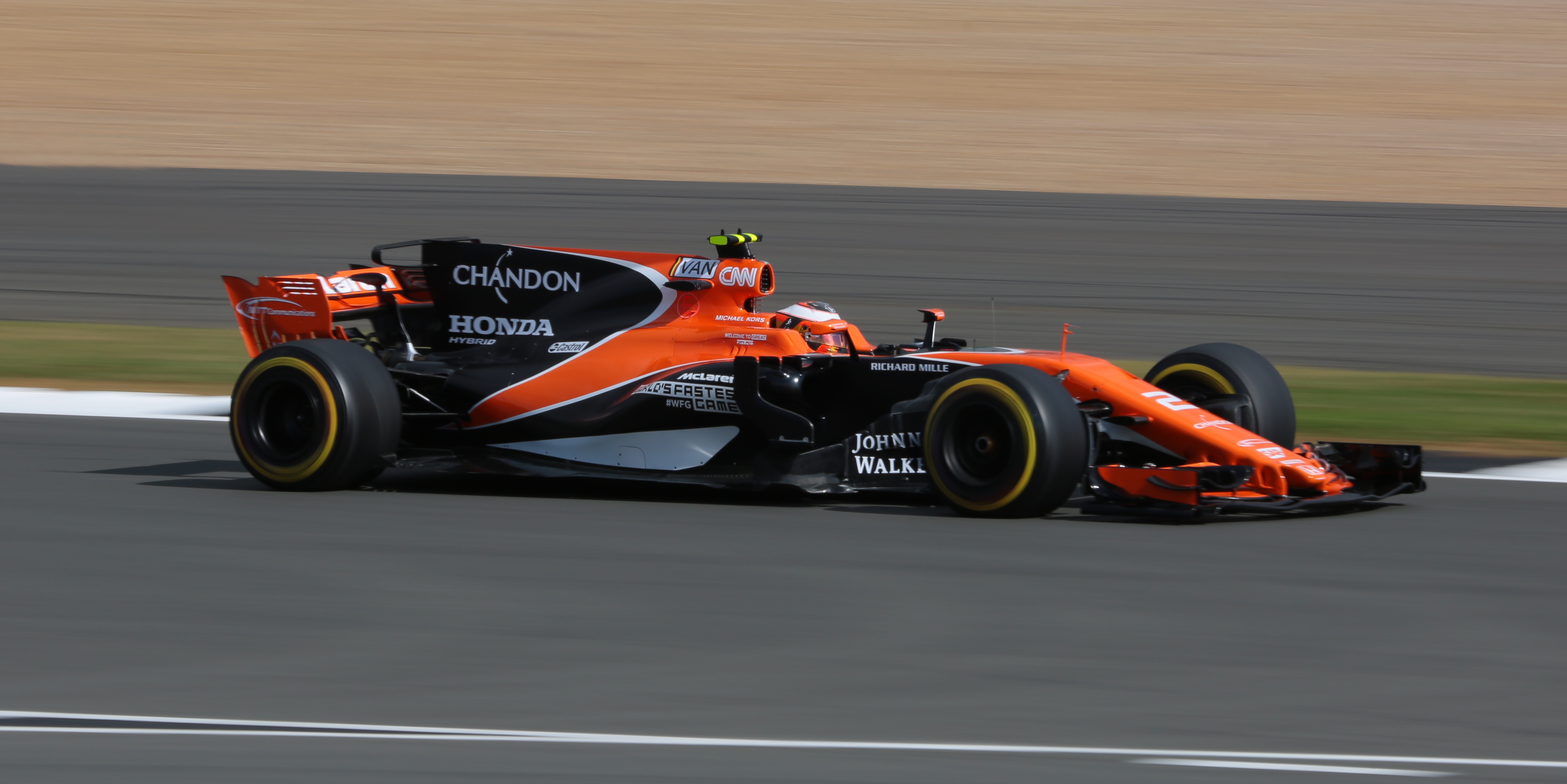 f1